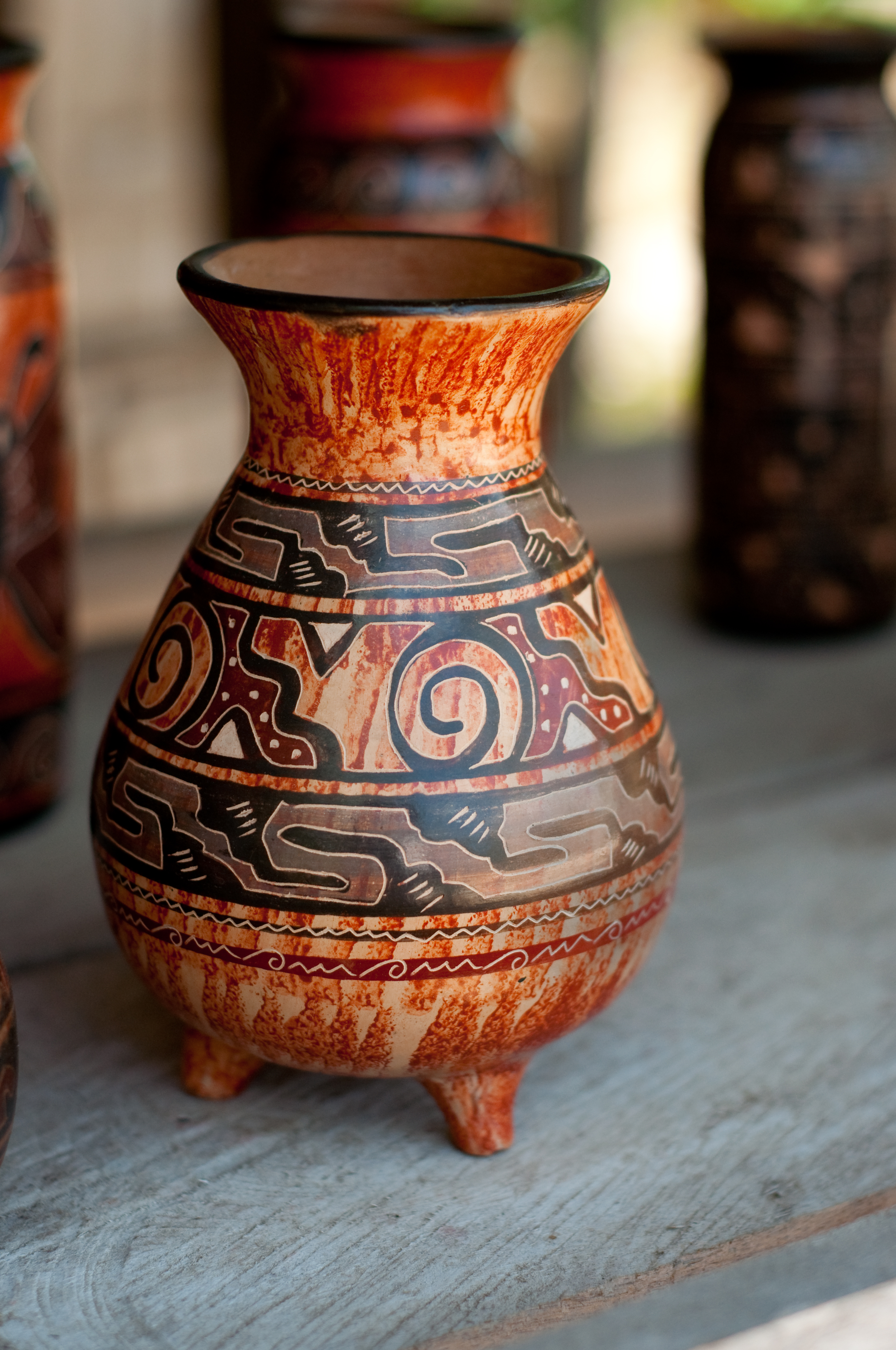 Cerámica nicoyana del pueblo de Guaitil, Santa Cruz de Guanacaste, Costa Rica.